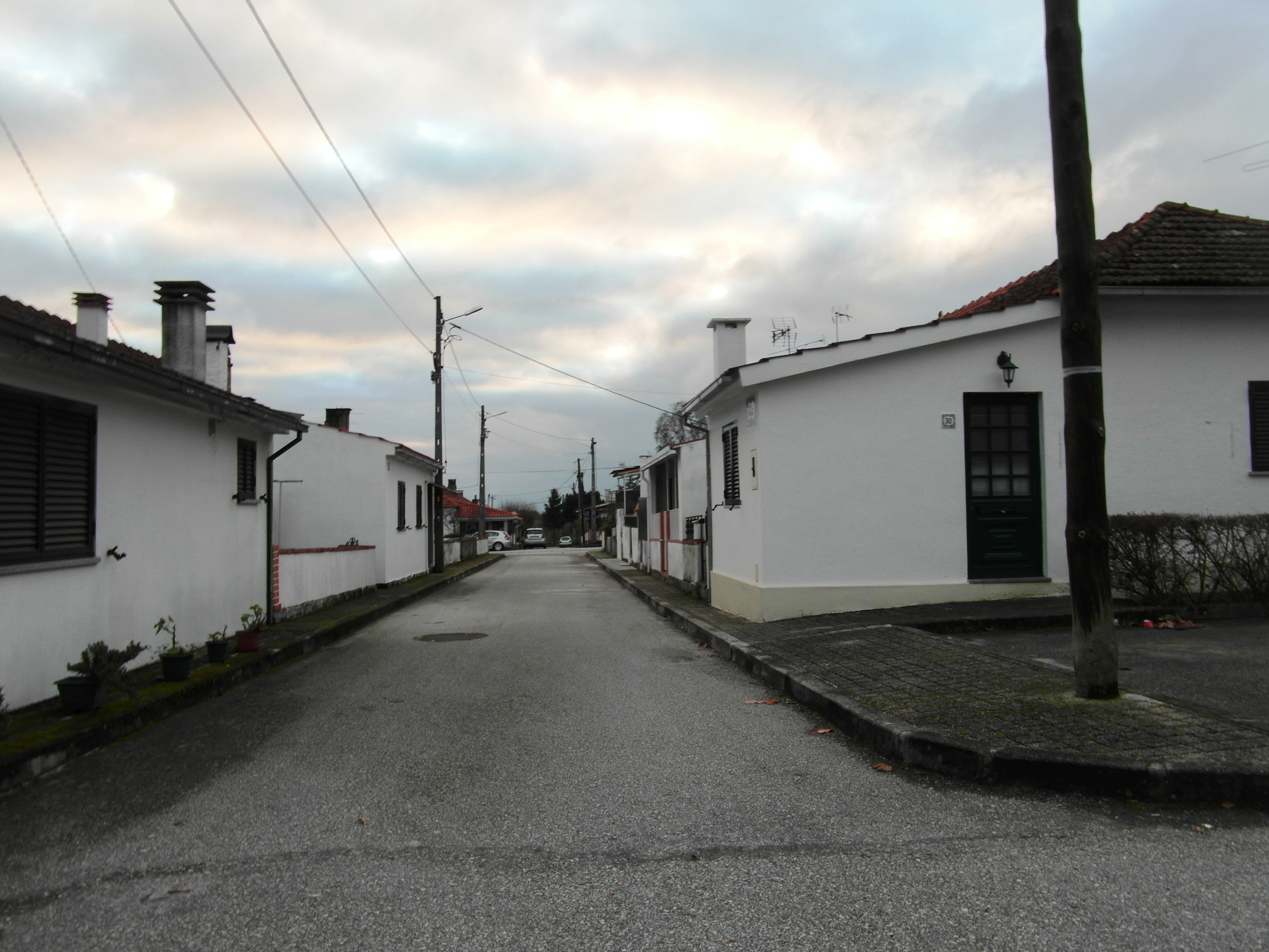 Bairro da Urgeiriça, Nelas